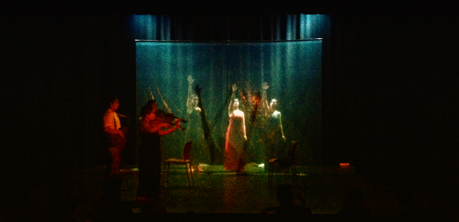 Des vies souterraines, de Paula Espinoza en el marco del "IV MUTIS".